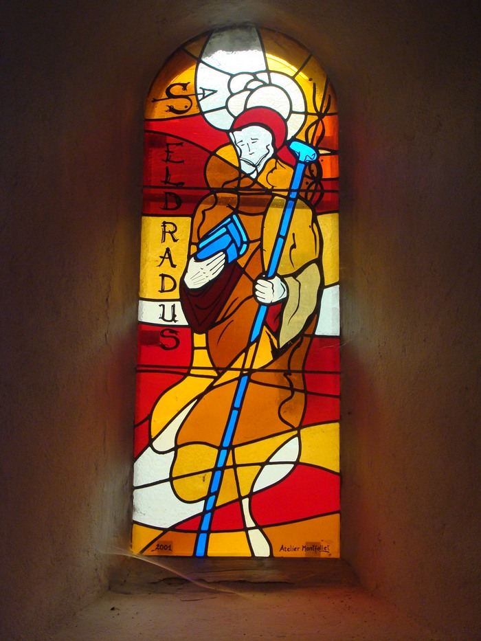 Vitrail représentant Saint-Eldrade, patron de Corps (Isère), dans l'église paroissiale.